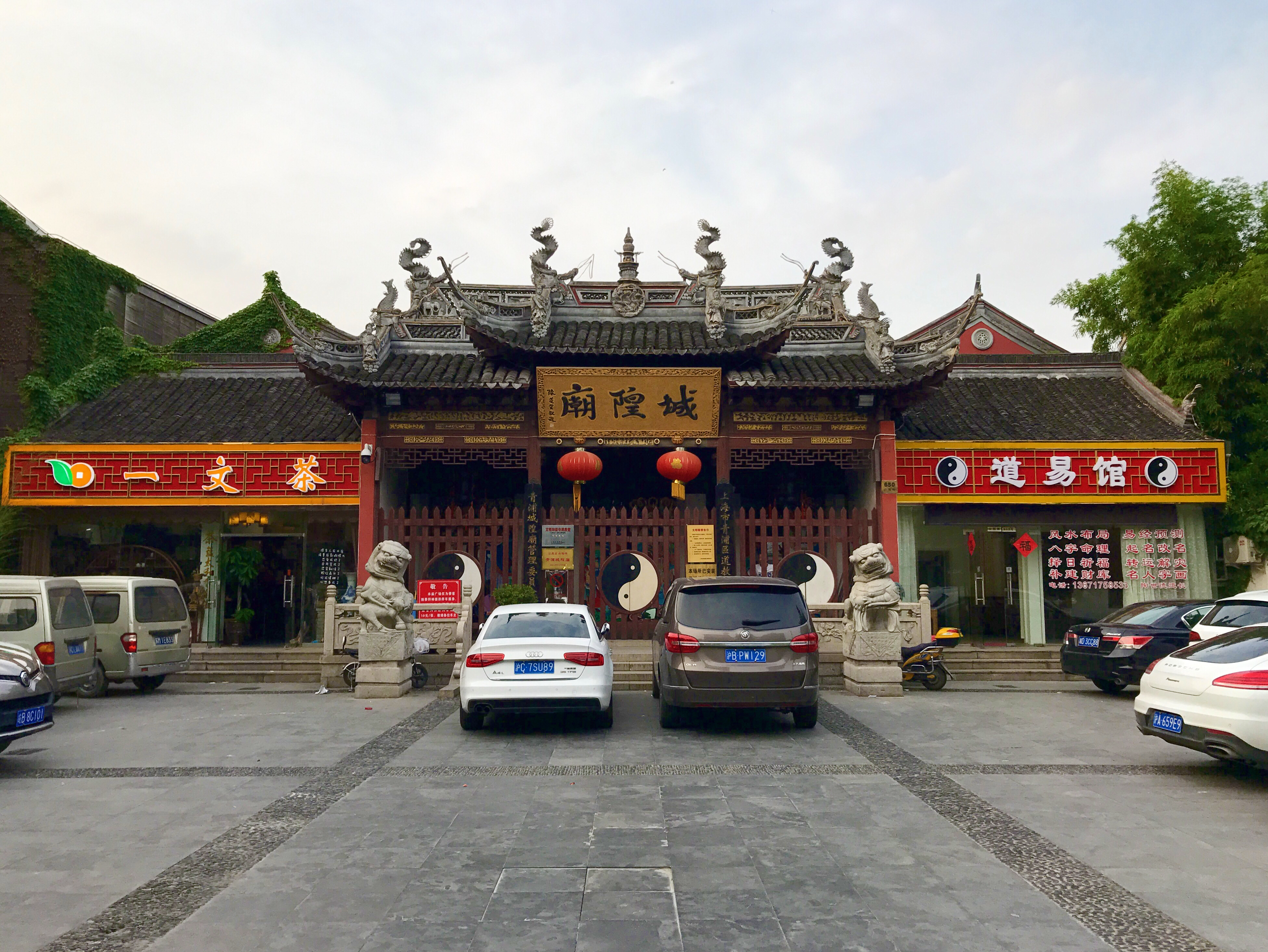 青浦城隍庙头门、戏台和娘娘殿 青浦区盈浦街道公园路650号